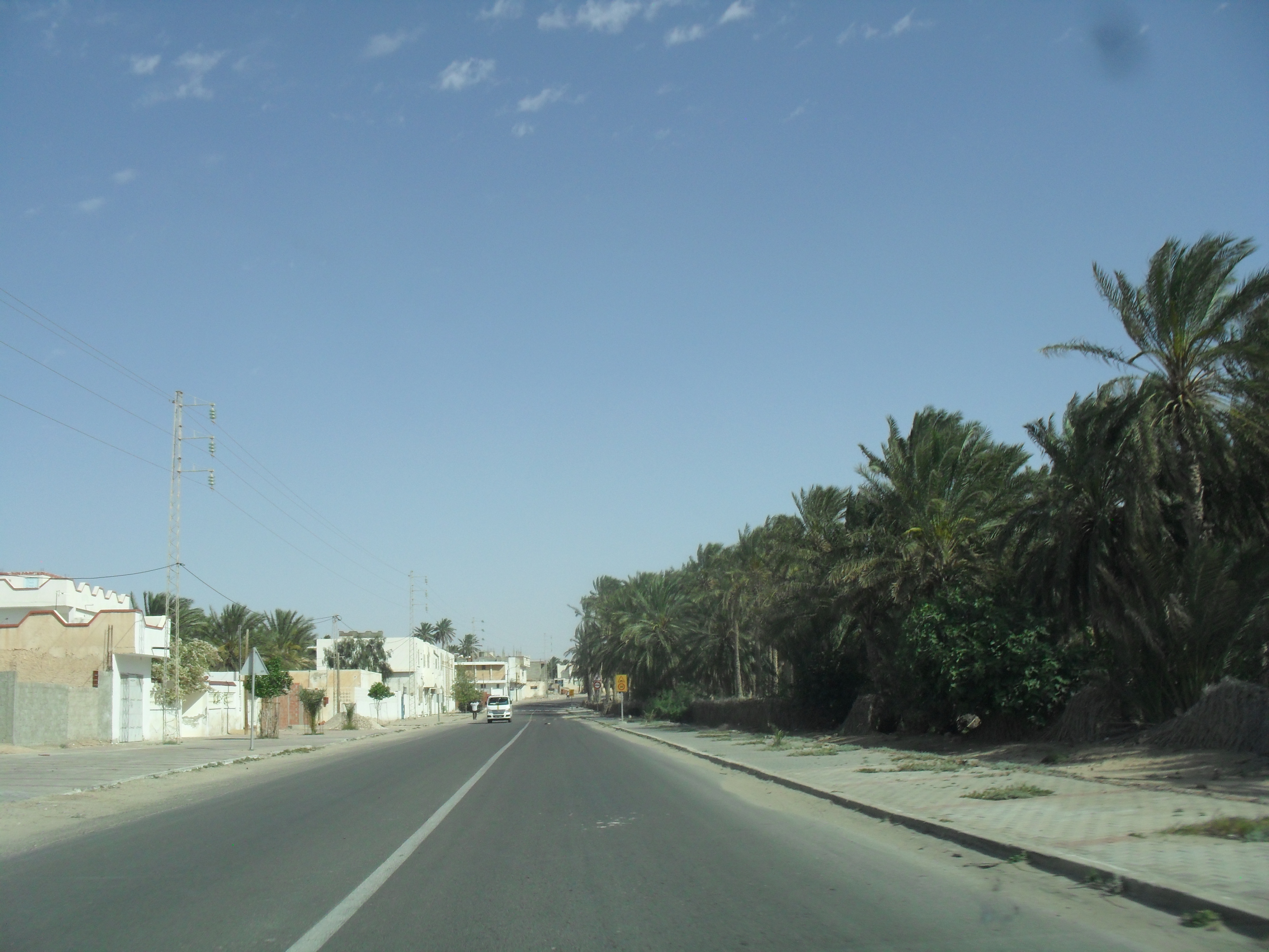 с. Томбар